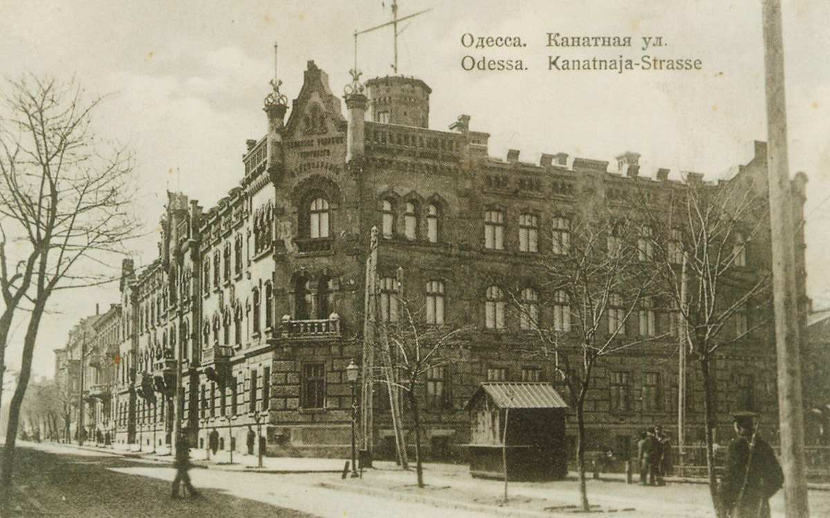 1=Канатна вулиця в Одесі (початок XX ст.). Фотографія початку XX ст. (в центрі будинок торгового мореплавання)